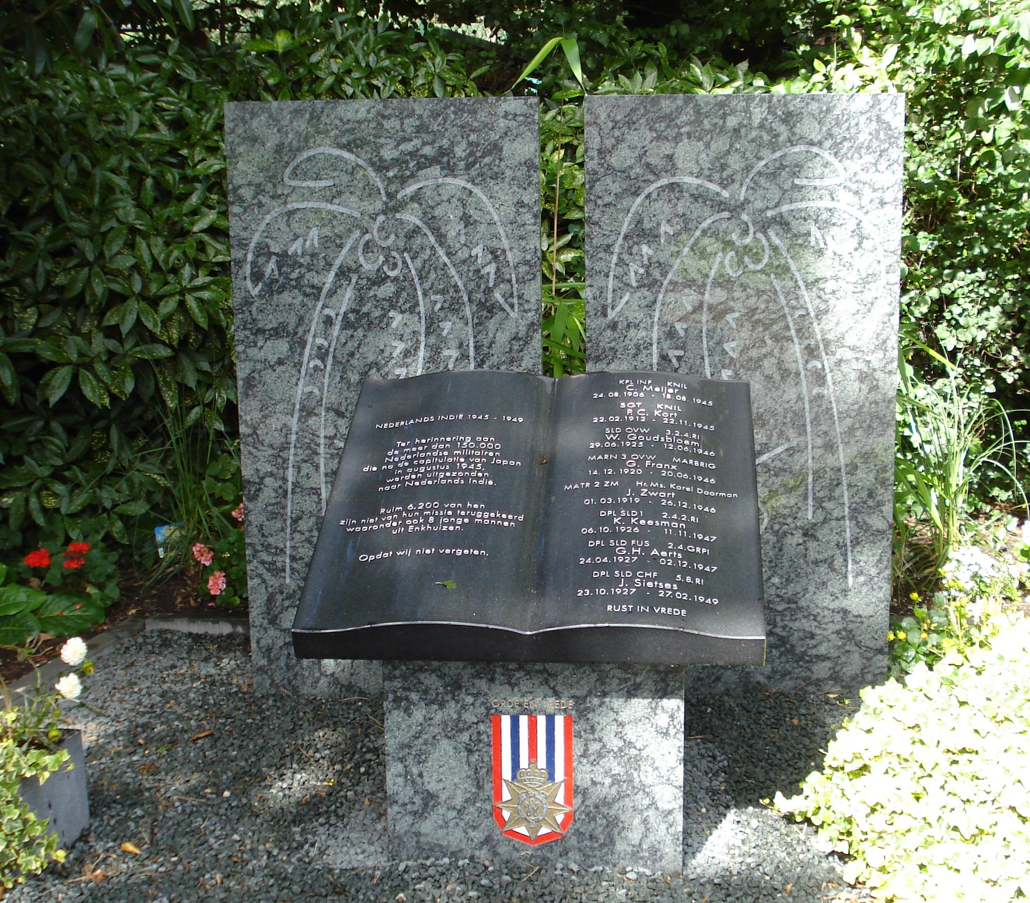 Enkhuizen, Wilhelminaplantsoen. Kunstwerk "Indië-Monument" van Theo Stavenuiter en J. Brieffies. Enkhuizen/The Netherlands. FOP.